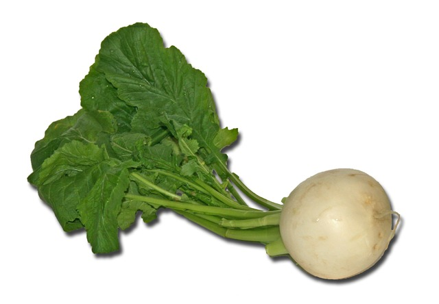 Ägräs oli muun muassa nauriin haltija.